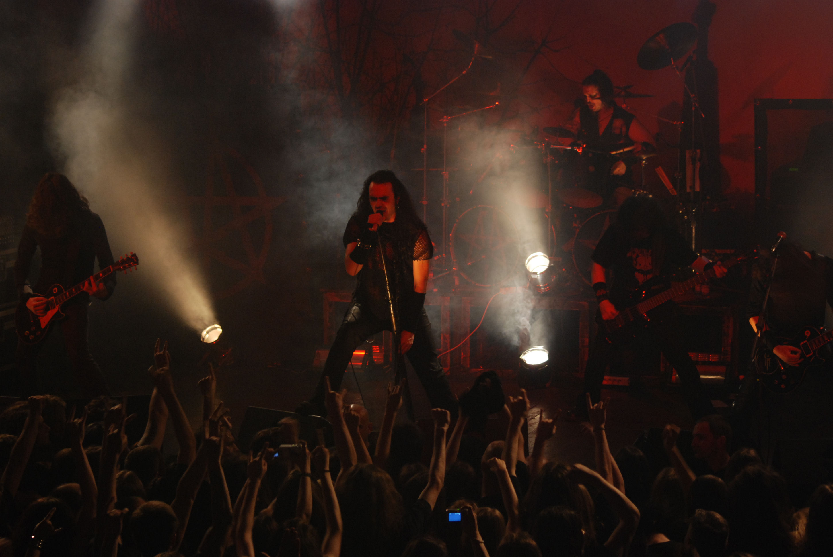 Koncert Moonspell'a w klubie Studio w Krakowie